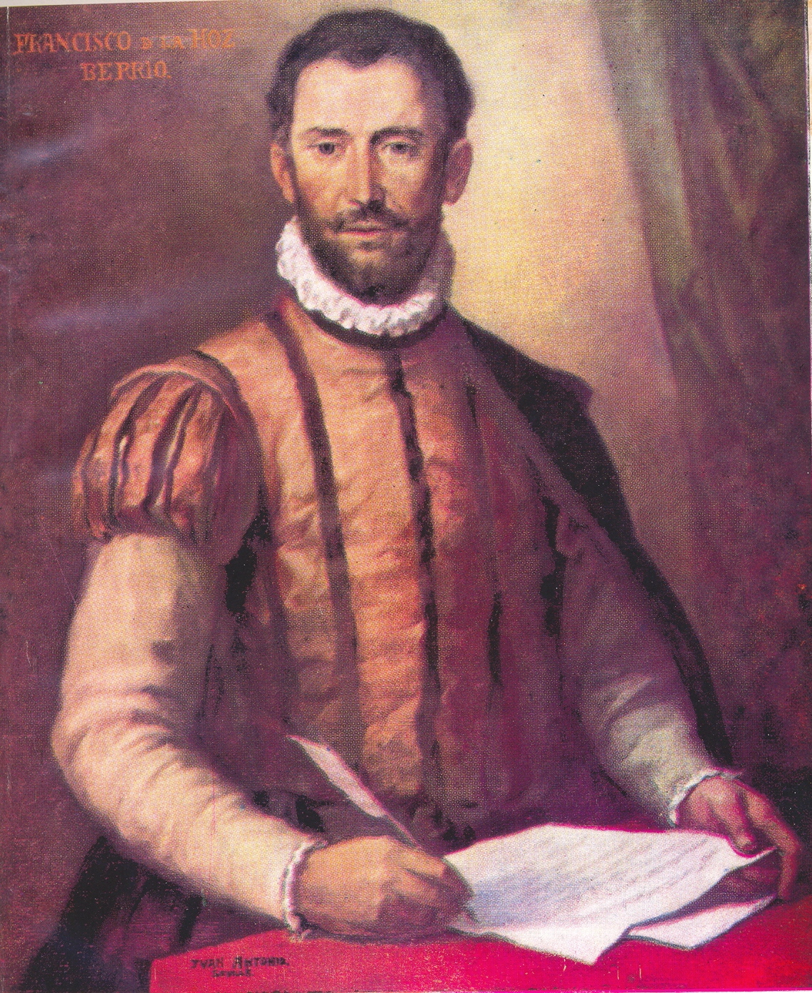 Don Francisco de la Hoz Berrio y Oruña, Obra de Juan Antonio Rodriguez Fernandez. 1963. Tomado del Libro "Origenes de Acrigua" del Hermano Nectario Maria Pratlong.